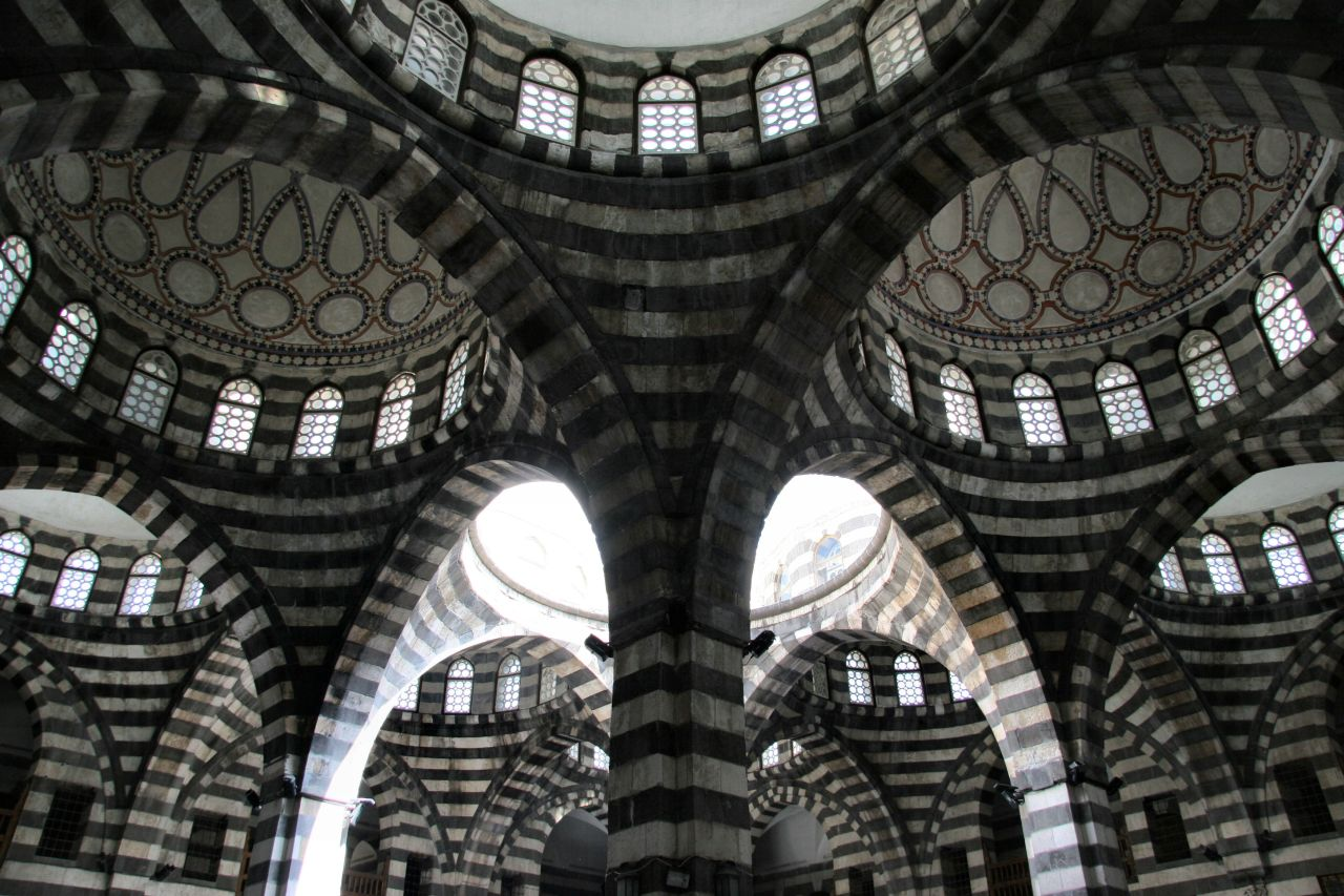 Khan As'ad Pacha Al-'Azem - Damascus